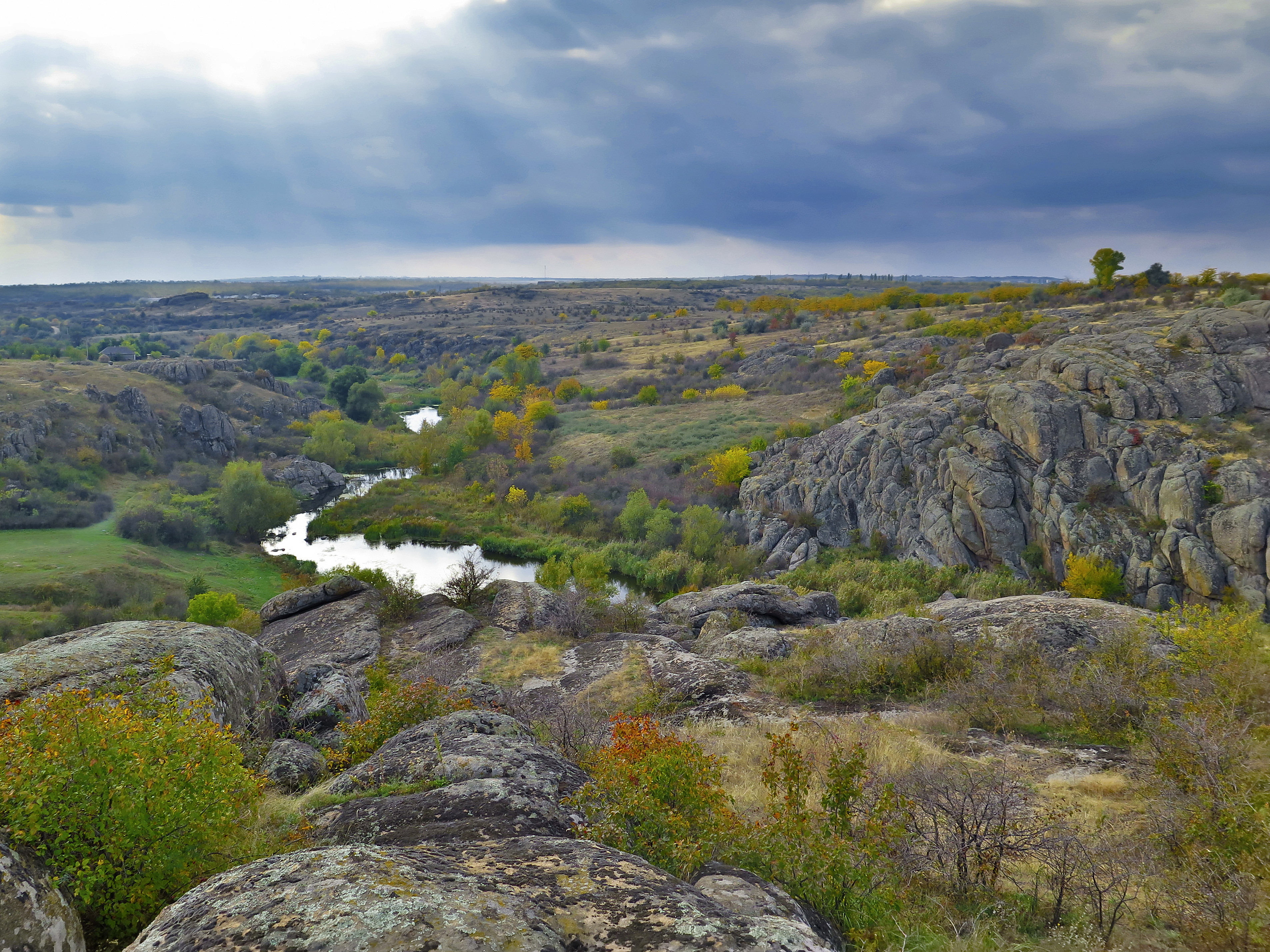 Національний природний парк «Бузький Гард», Кривоозерський, Первомайський, Арбузинський, Вознесенський, Доманівський, Братський р-ни